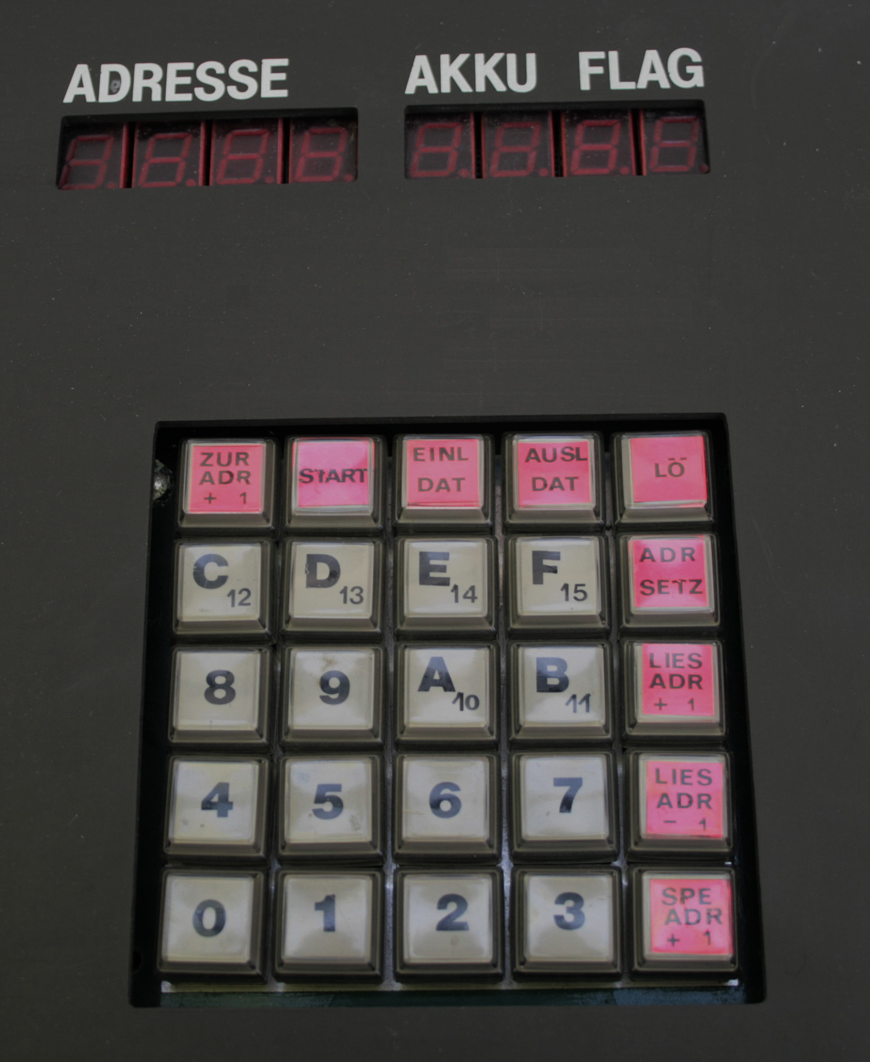 Tastatur mit 16 Hexadezimal- und 9 Funktionstasten, und 8stellige Siebensegmentanzeige des EZ80-DIT Prototyp Mikrocomputers